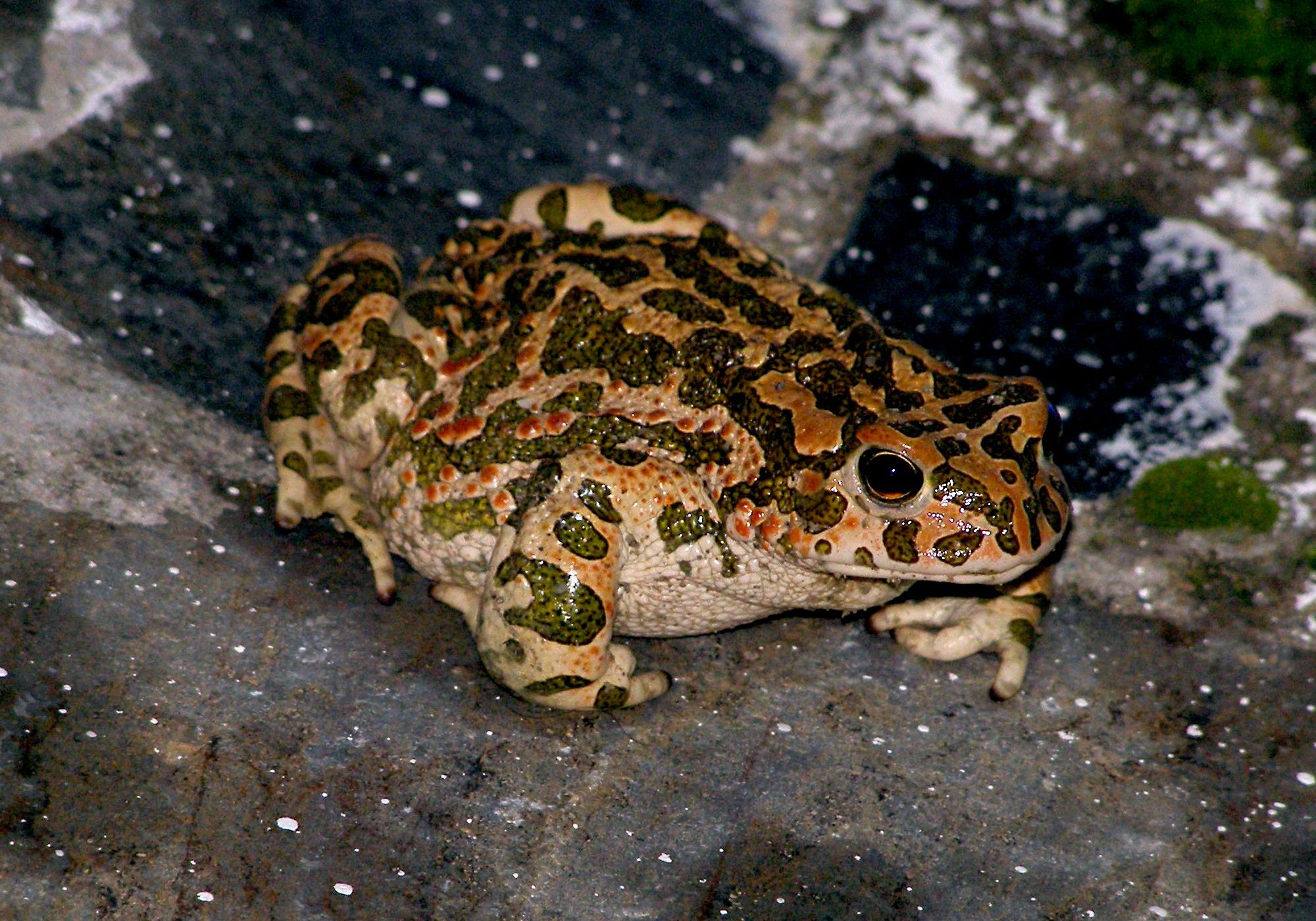 Älteres Wechselkrötenweibchen, aufgenommen auf Kreta